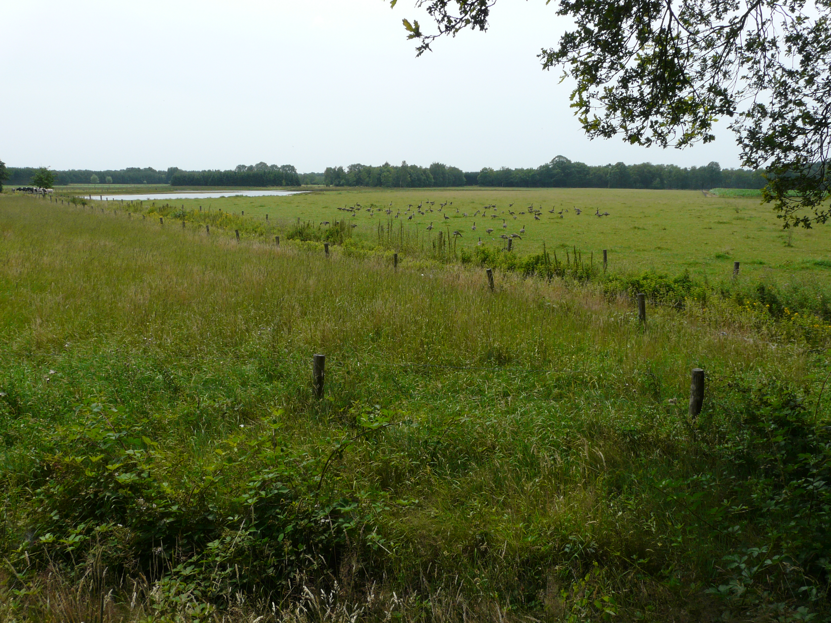 Pannenhoef, blauwe wandeling